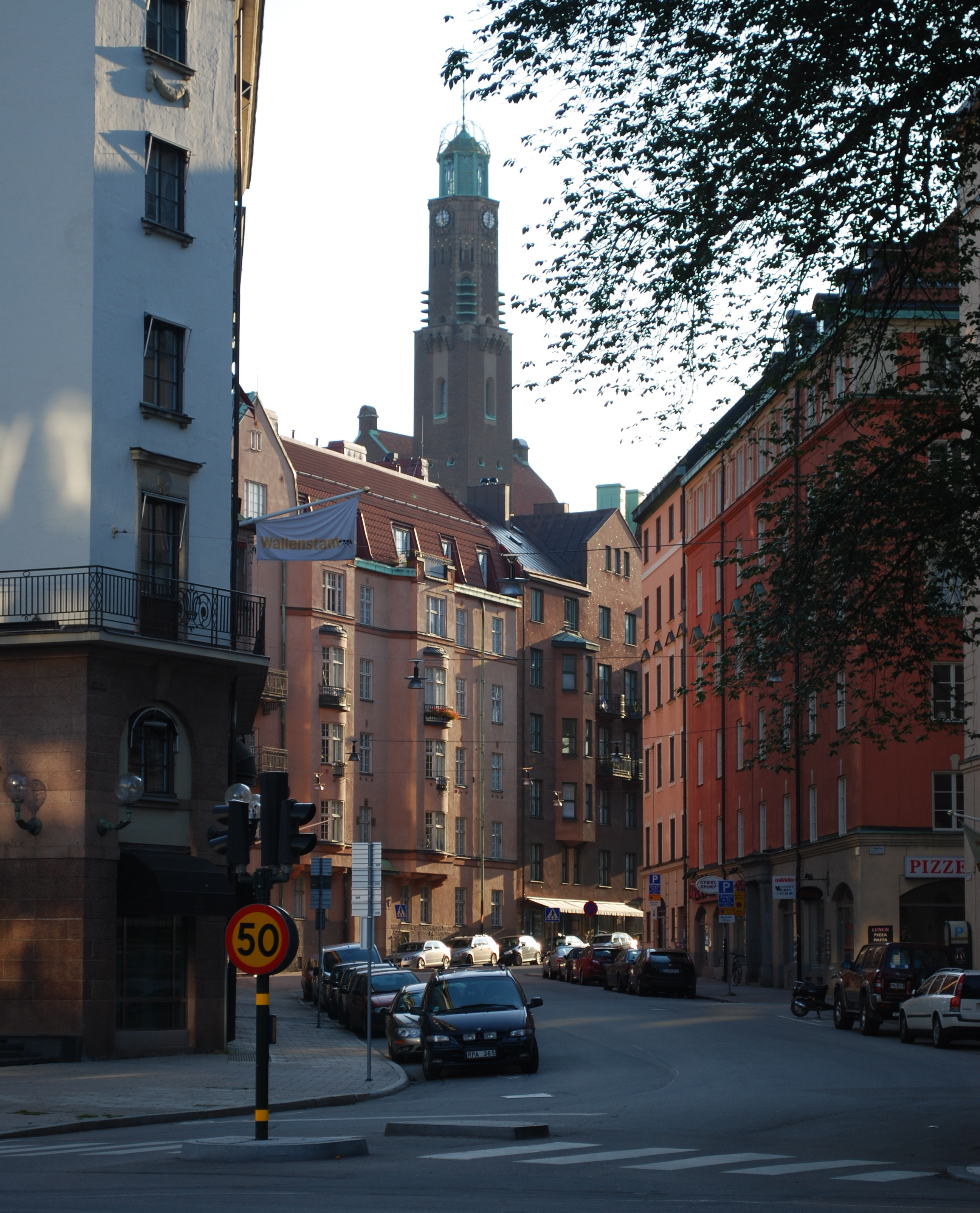 Rådmansgatan, Stockholm. i nordöstlig riktining från korsande Birger Jarlsgatan. I bakgrunden Engelbrektskyrkan